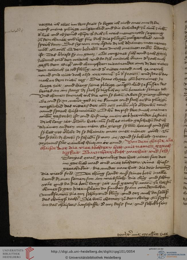 Pius ; Wyle, Niklas von [Übers.]. Cod. Pal. germ. 101: 'Gesta Romanorum', dt. ; Aeneas Silvius Piccolomini: De duobus amantibus Euryalo et Lucretia, in der Übersetzung des Niklas von Wyle (1. Translatze) ; Lucianus Samosatensis (Druck) ; Giovanni Boccaccio (Druck). Europeana. Retrieved on 2015-09-25.